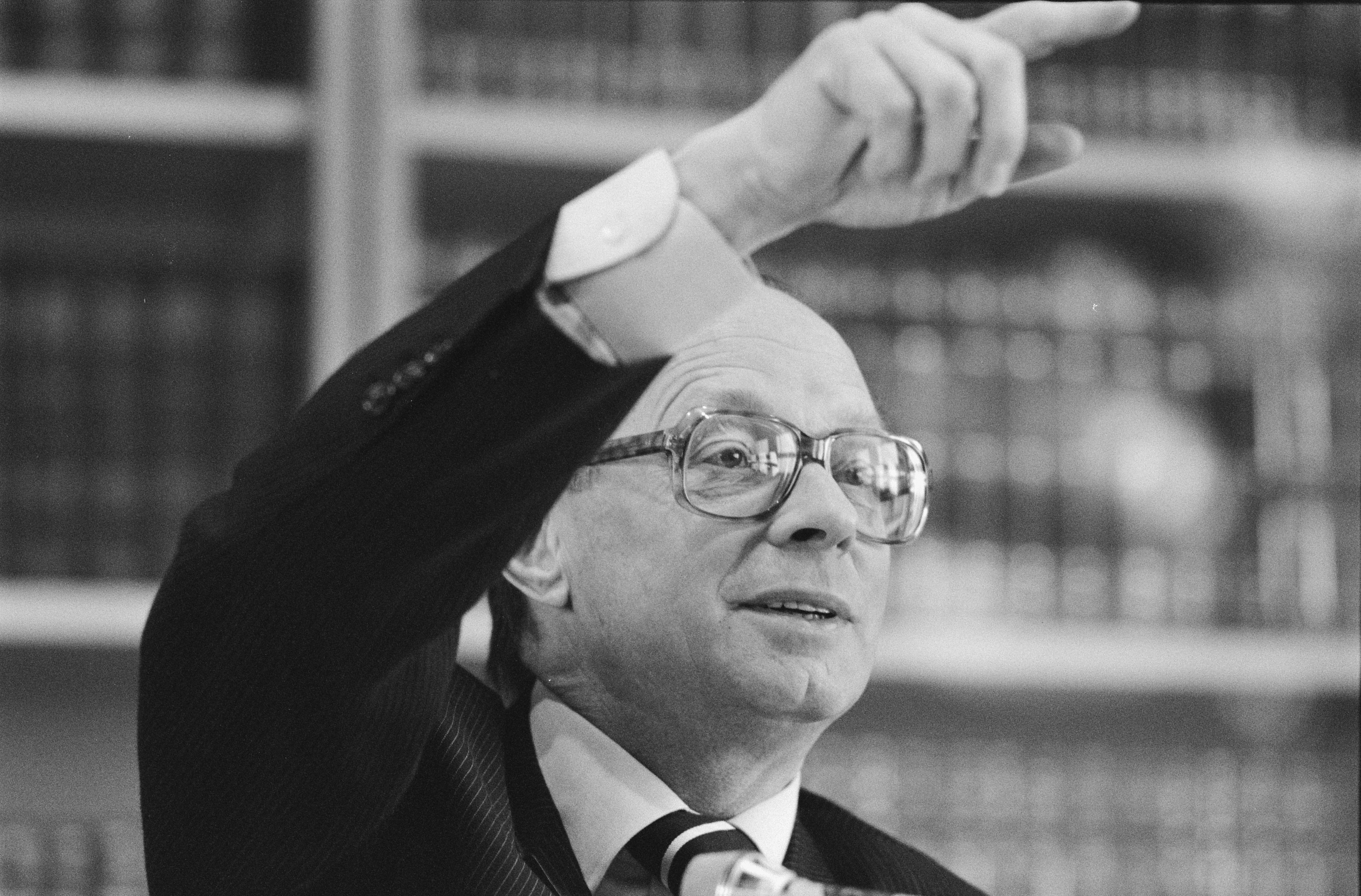 Prof. dr. P. J. Vinken, bestuursvoorzitter van Elsevier, tijdens de persconferentie over het jaarverslag. 11 april 1989